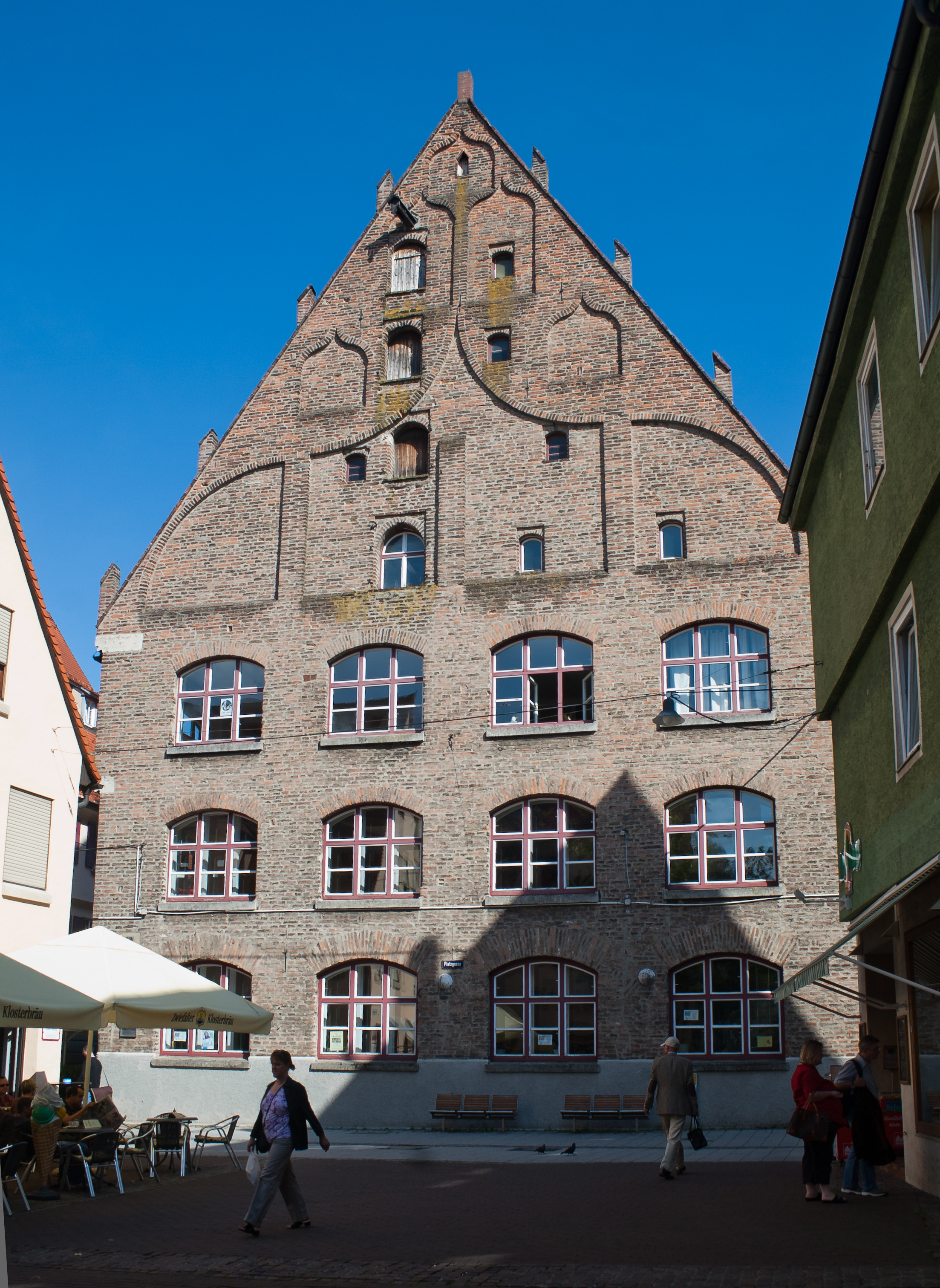 Ulm, Baden-Württemberg, Germany